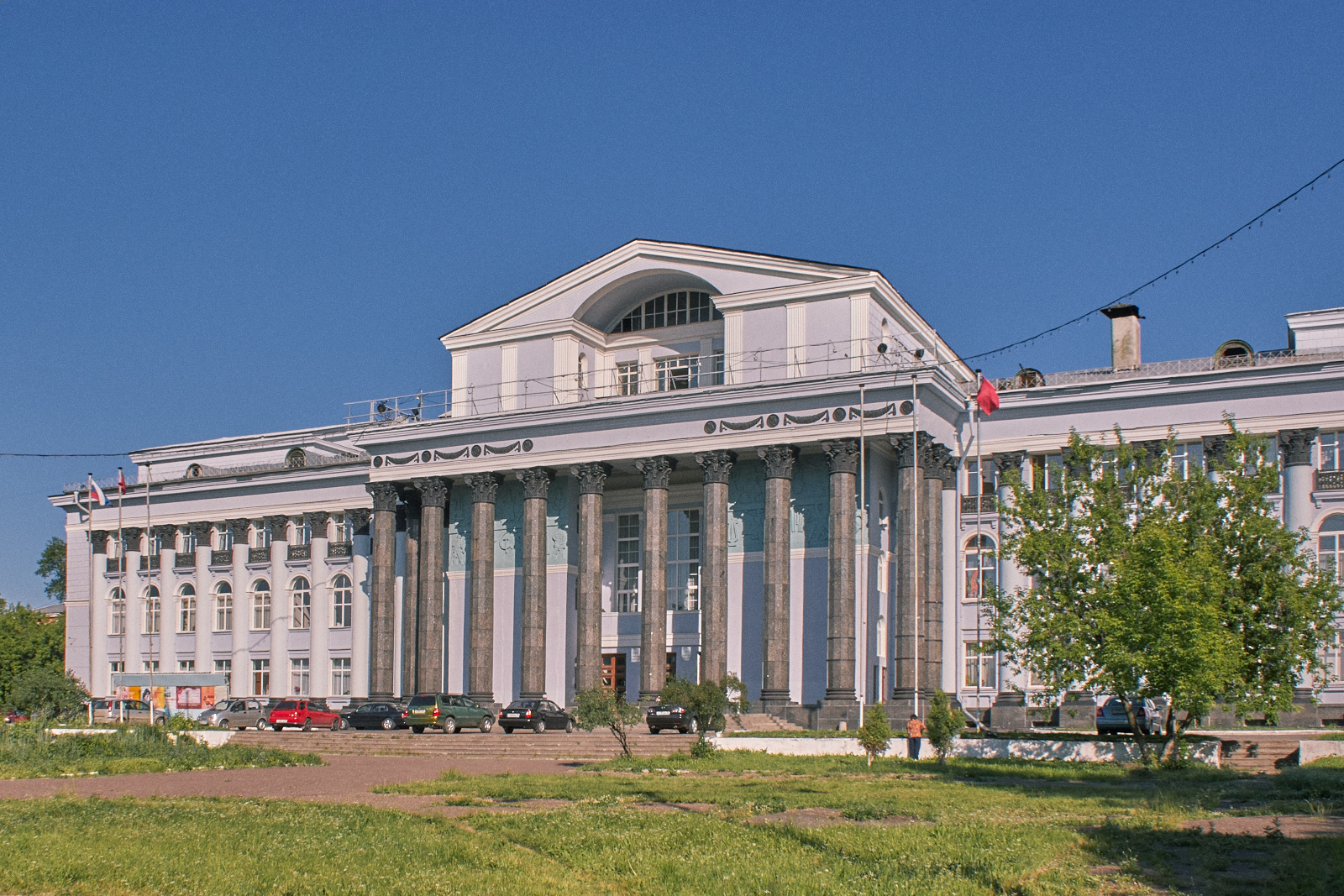 Дворец культуры им.В.И.Ленина (Пермский край, Пермь, улица Уральская, 93)